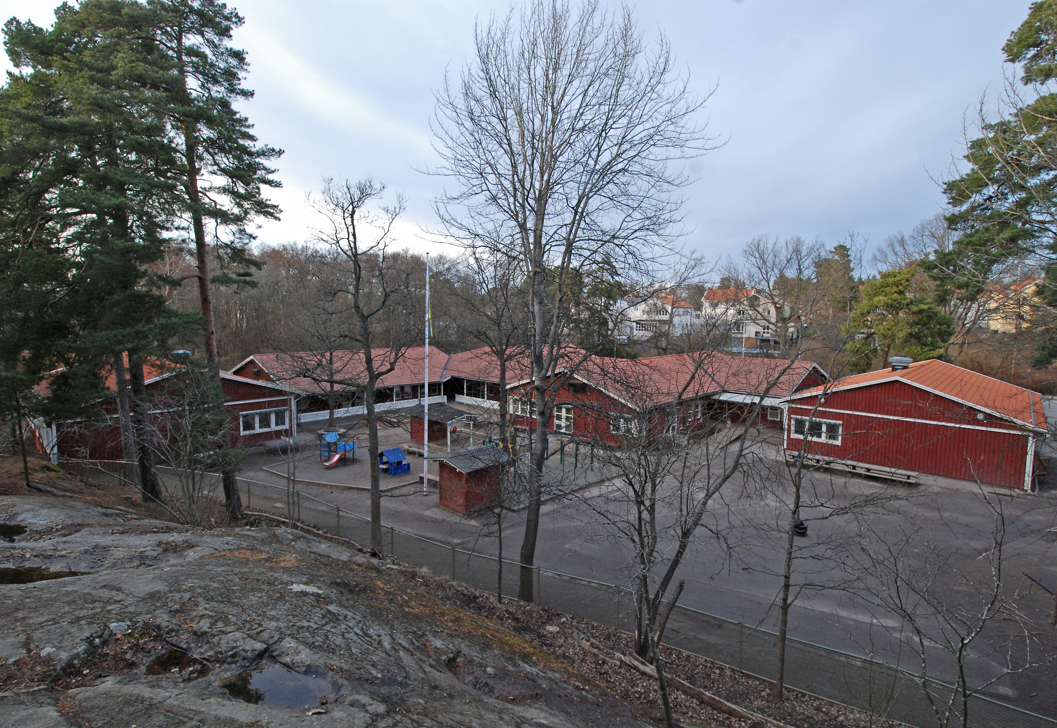 Bromma Enskilda Skola